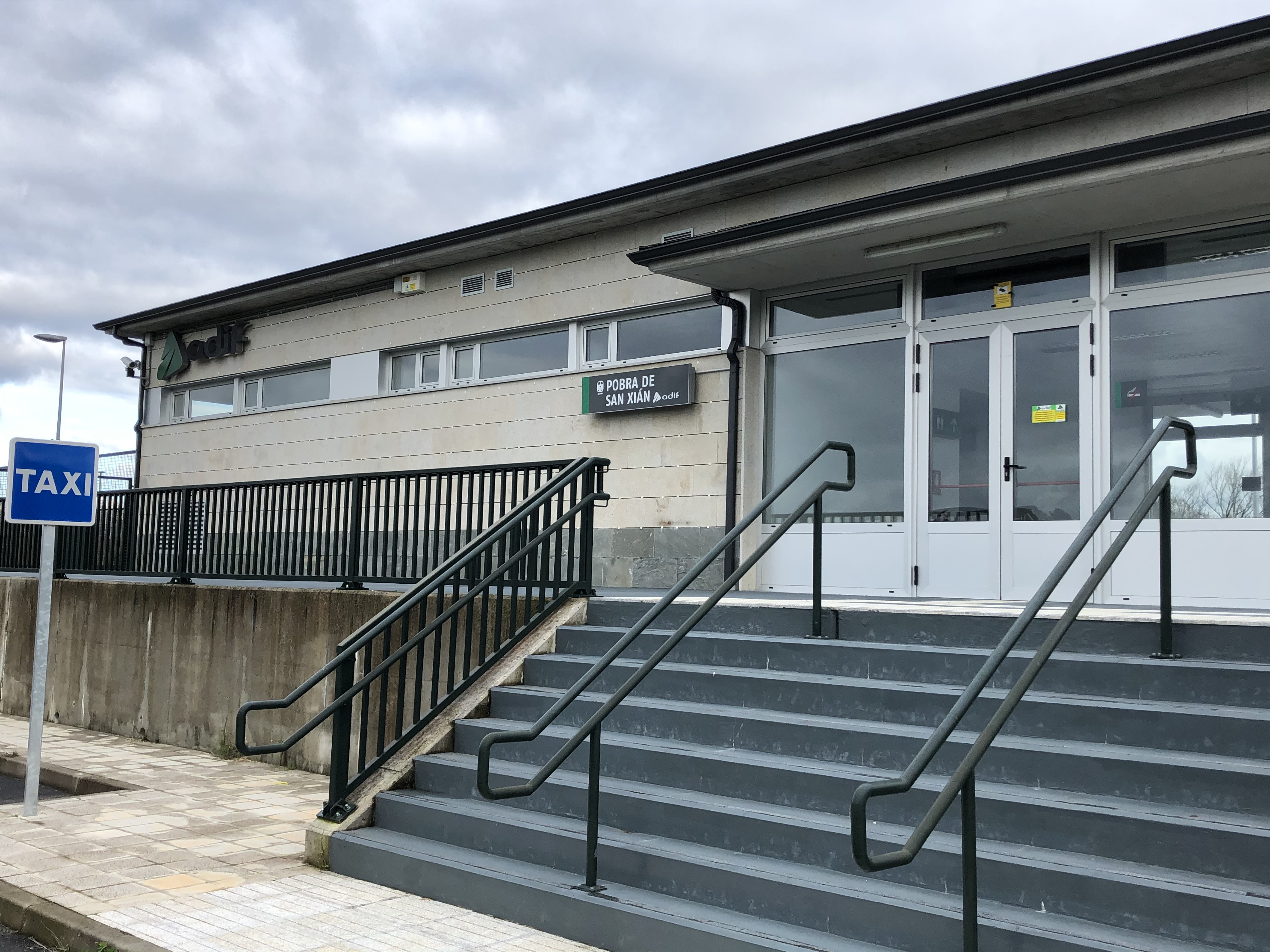 Estación de A Pobra de San Xiao, en el municipio de Láncara, provincia de Lugo, España.